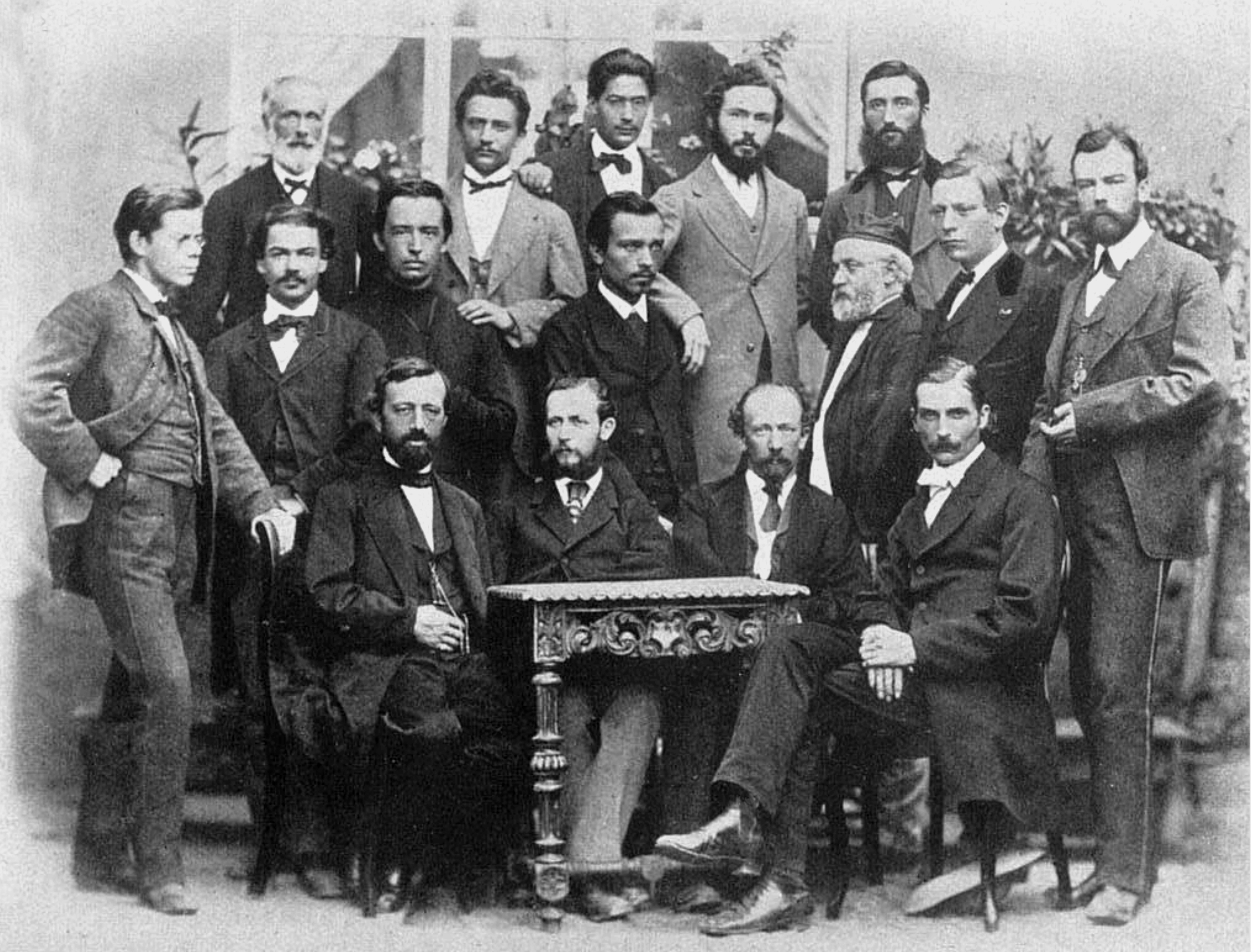 Mitarbeiter von August Kekulé (* 7. September 1829 in Darmstadt; † 13. Juli 1896 in Bonn) in Bonn Stehend (hintere Reihe) vlnr: Thomas (United Kingdom) Friedrich Roderburg, Doktorand Bernhard Mohr Friedrich Krafft (* 21. Februar 1852 in Bonn; † 3. Juni 1923 in Heidelberg) (August) Peter Flesch, Doktorand Stehend (mittlere Reihe) vlnr: Wilhelm Koenigs (* 22. April 1851 in Dülken; † 15. Dezember 1906 in München) Ludwig Purpur (Paris) Ferdinand Hermes Friedrich Landolph (Büren/Schweiz), Doktorand Oberlehrer Dr. Friedrich Beckmann Preschern (Österreich) ???? möglicherweise Lothar Meyer (* 19. August 1830 in Varel; † 11. April 1895 in Tübingen) ????? vordere Reihe vlnr: ehem. Hüttendirektor Siegfried Stein Otto Wallach (* 27. März 1847 in Königsberg; † 26. Februar 1931 in Göttingen) Theodor Zincke (* 19. Mai 1843 in Uelzen; † 17. März 1928 in Marburg) Giannangelo Barbaglia (* 25. Februar 1838 in Mailand; † 13. Dezember 1891 in Pisa), [1][2]